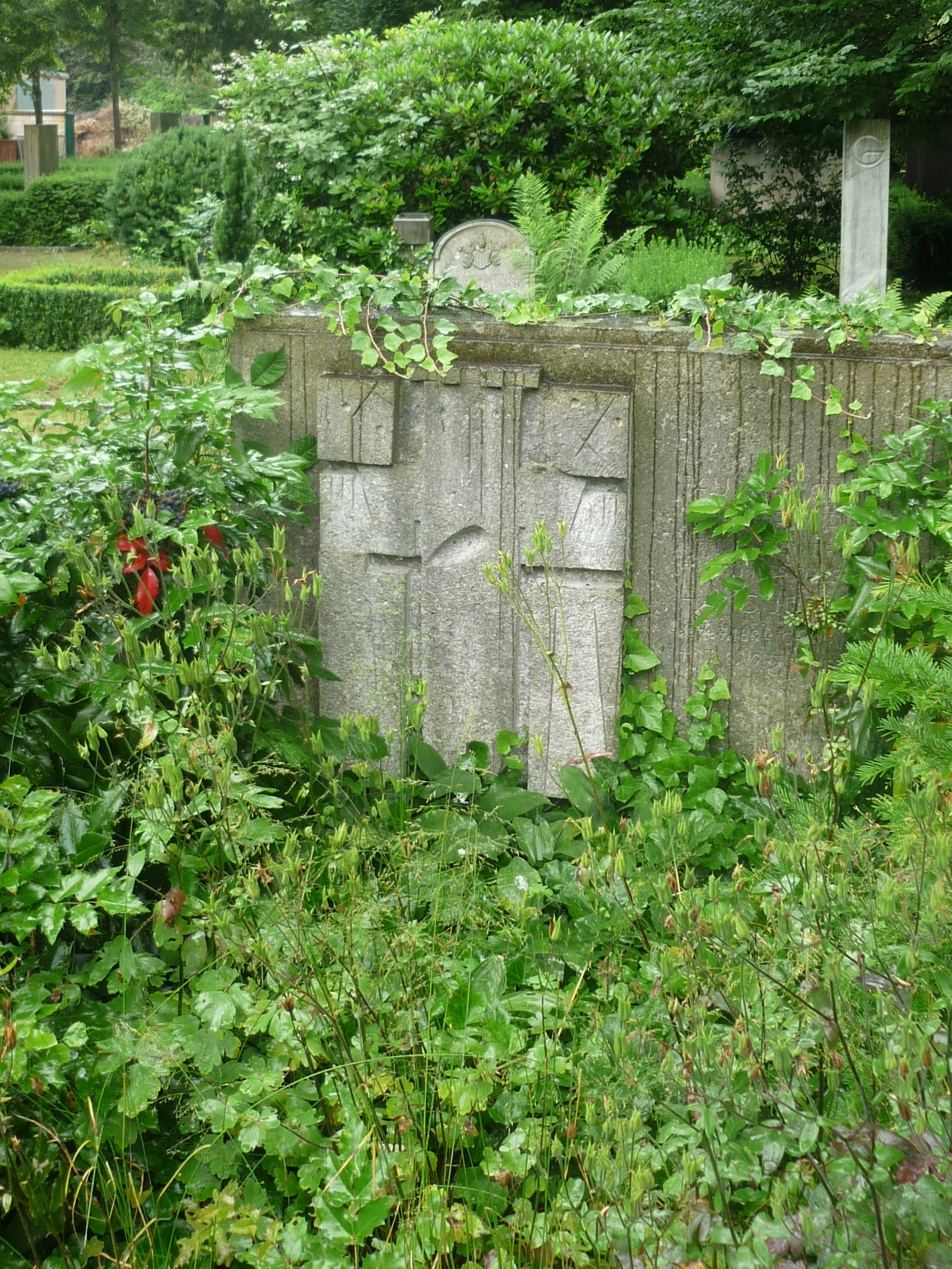 Loschwitzer Friedhof in Dresden-Loschwitz: Grabstätte Hans Jüchser (1894–1977), Maler (Grabstein von Friedrich Press)